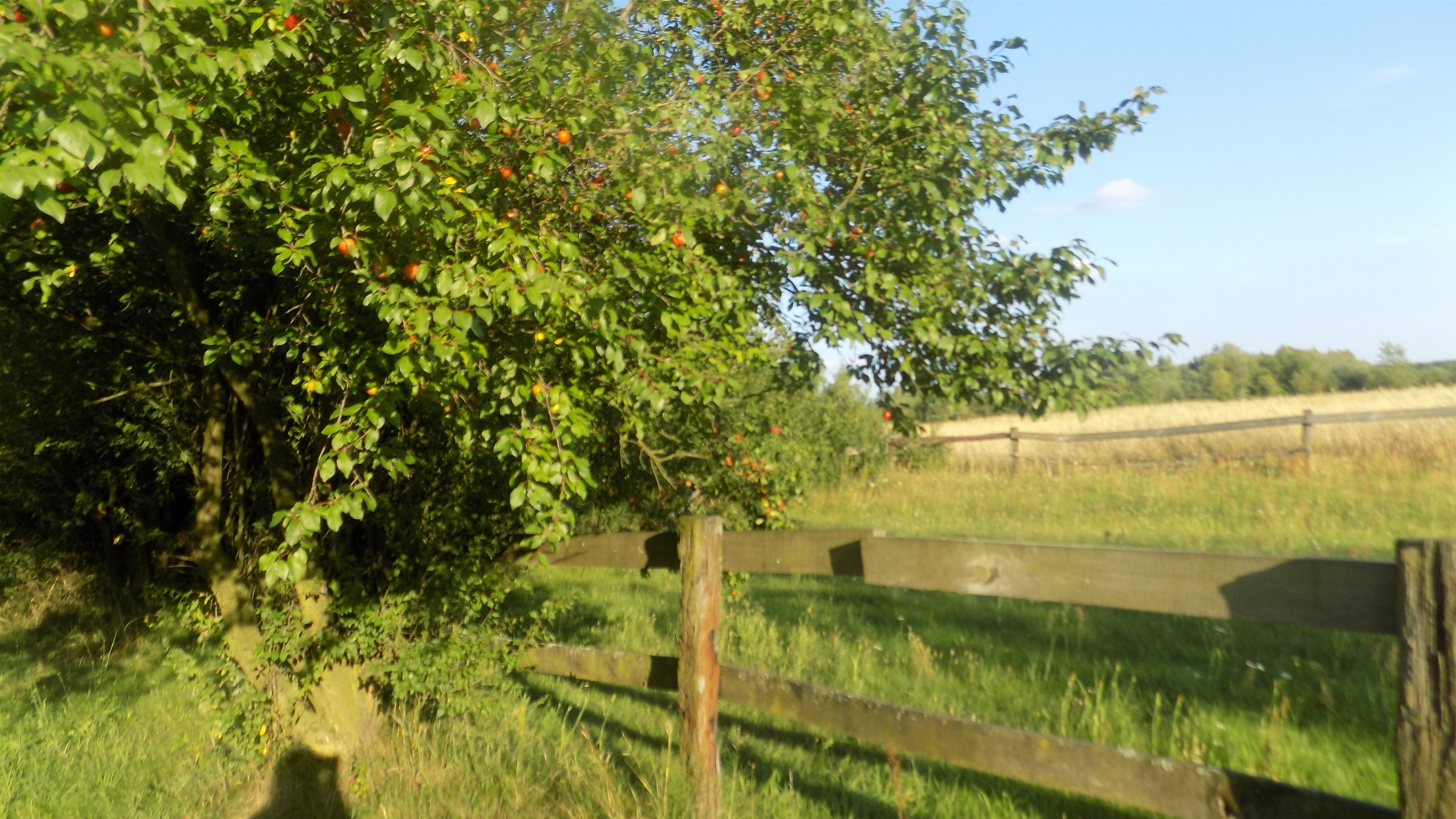 Nad Wieprzem, Dęblin, lubelskie